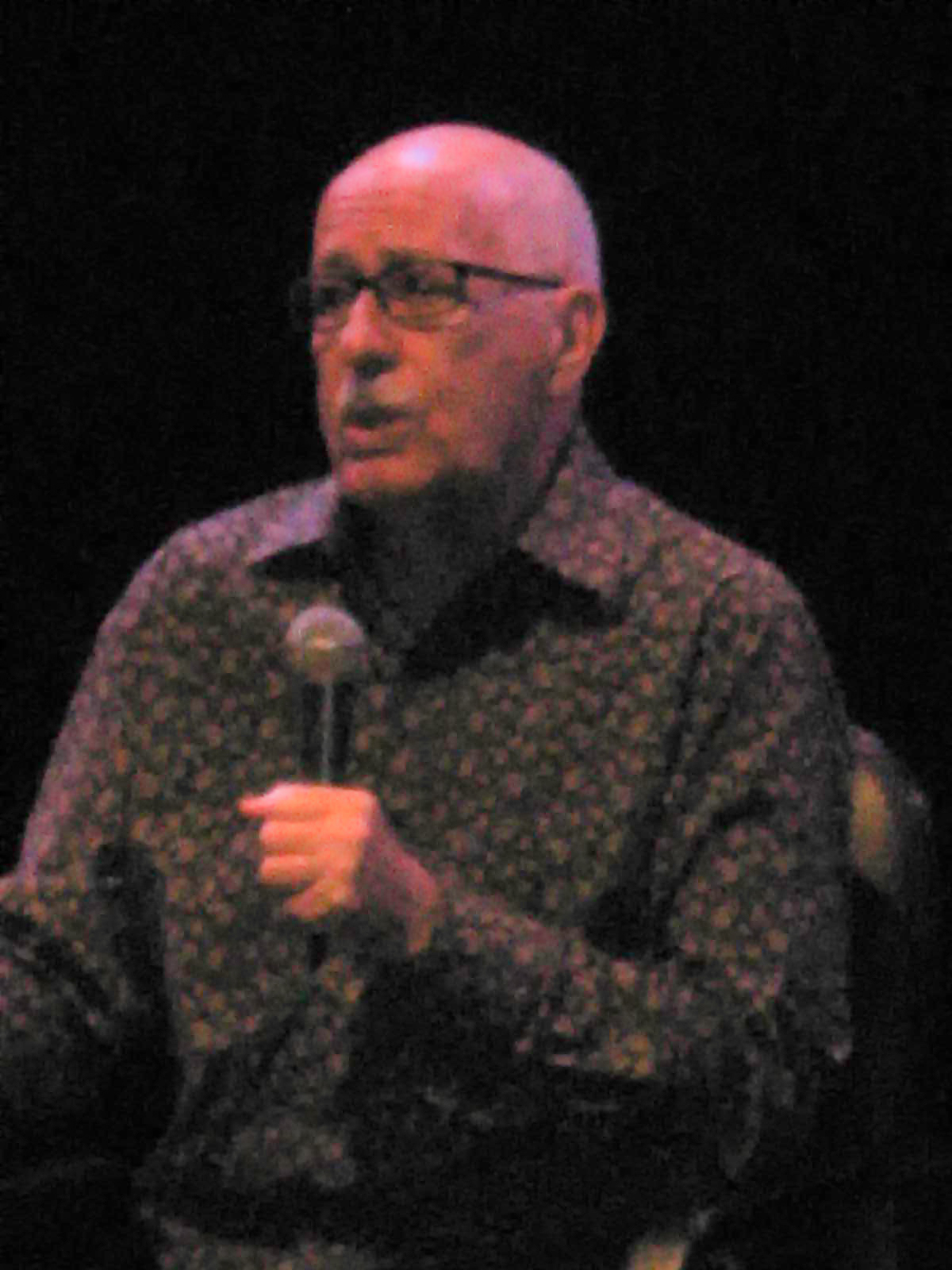 Silviano Santiago durante um encontro na UERJ em 2009.